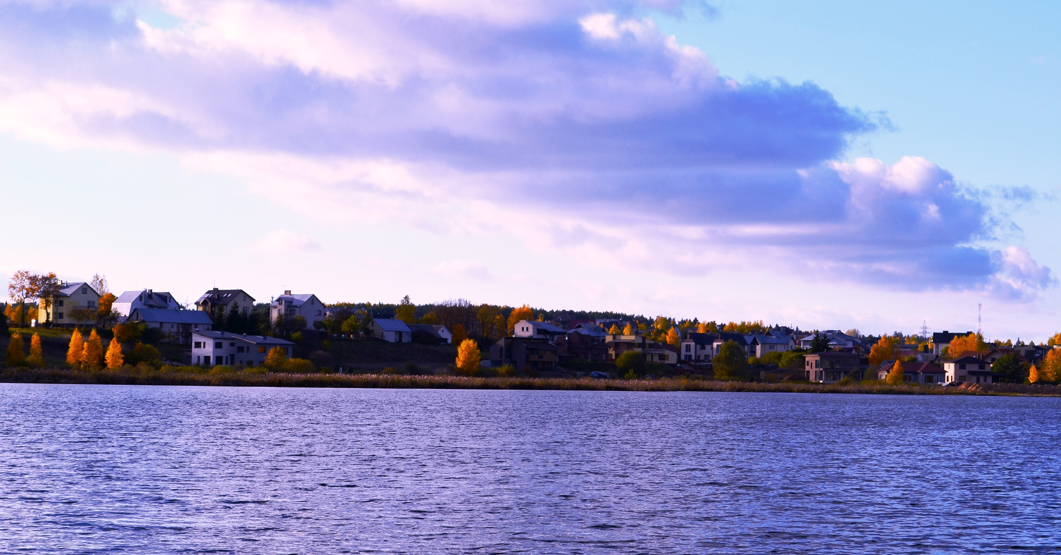 Antežeriai ir Gineitiškių ežeras, Vilniaus raj.